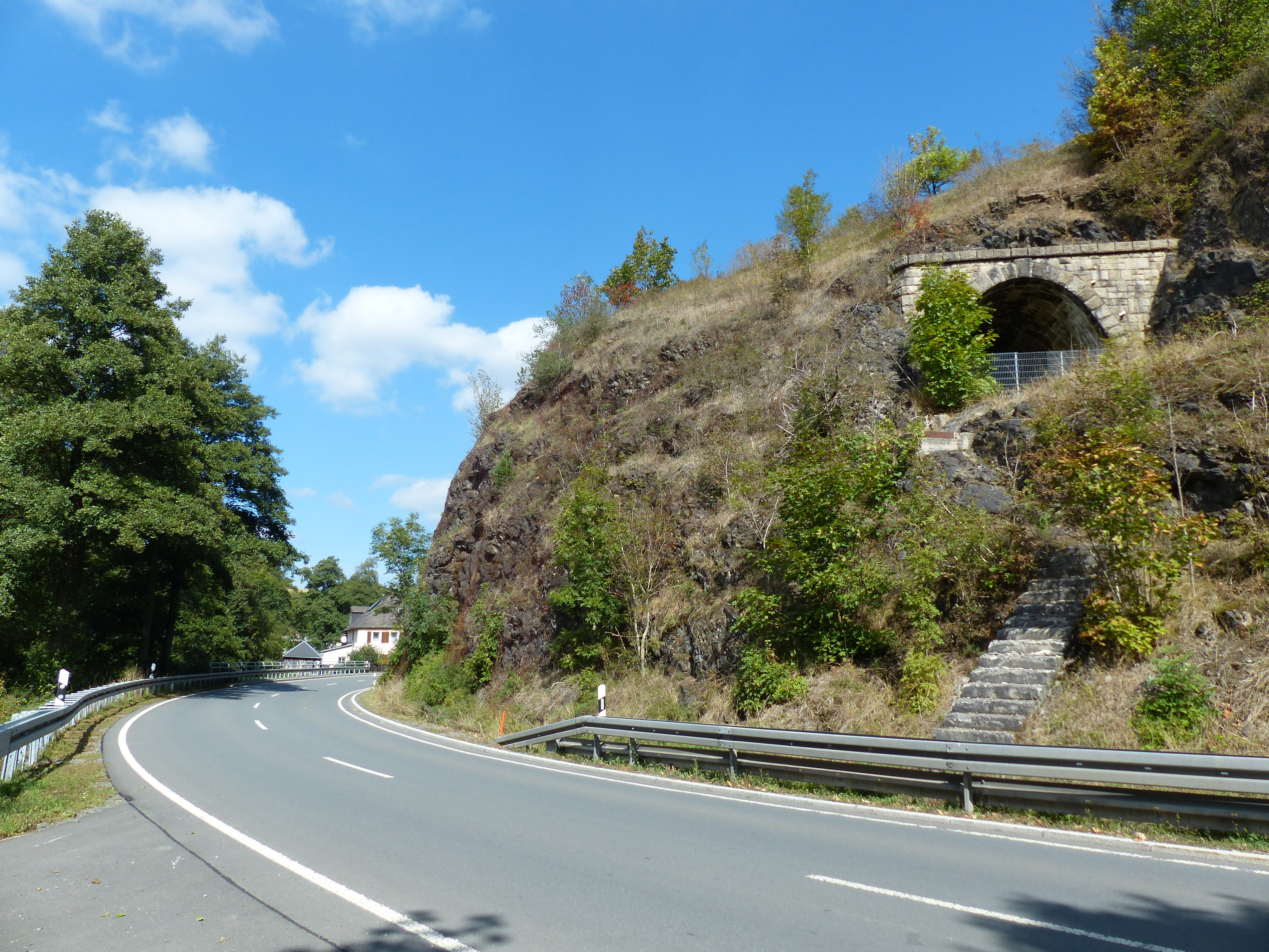 Ansichten von Weidesgrün: Tunnel, Geotop am Ortseingang